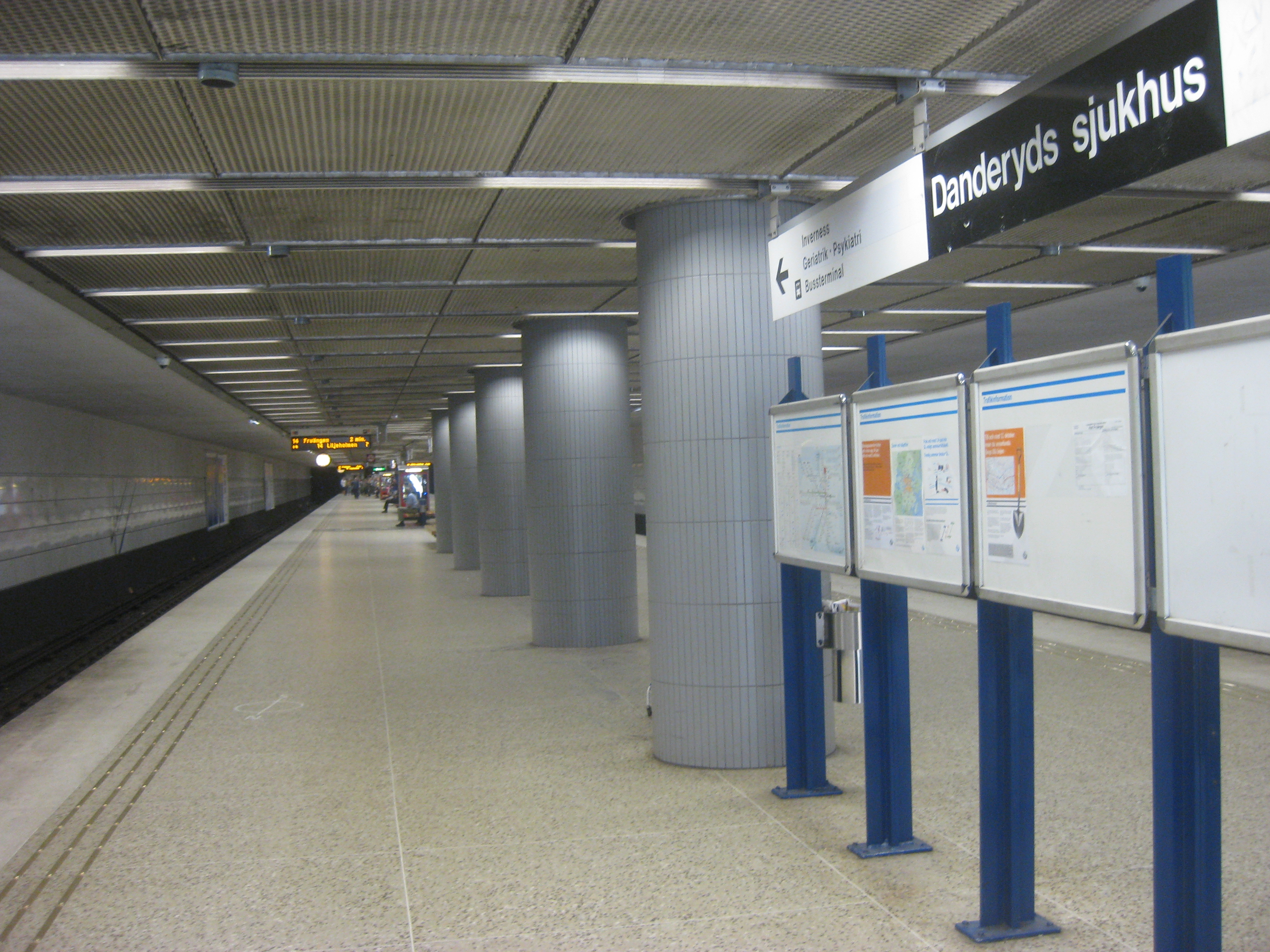 Danderyds sjukhus, a metro station in Stockholm, Sweden.